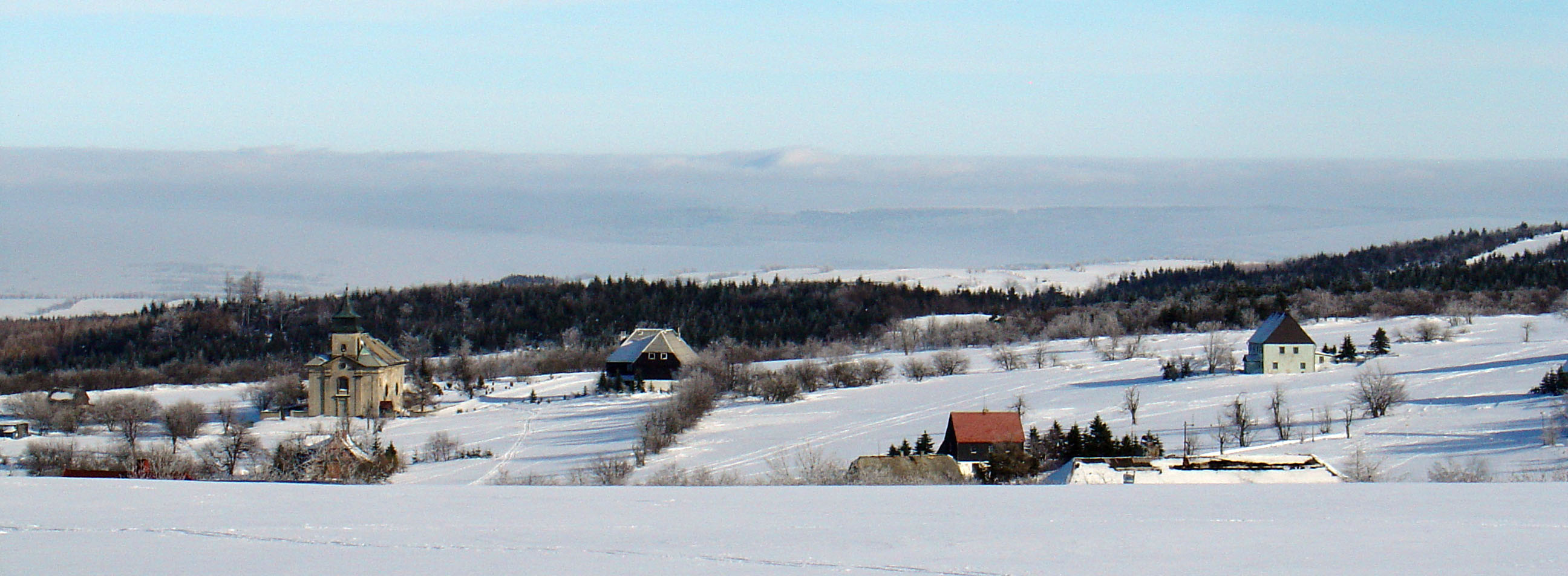 Cinovec Kirche Richtung Vorderzinnwald